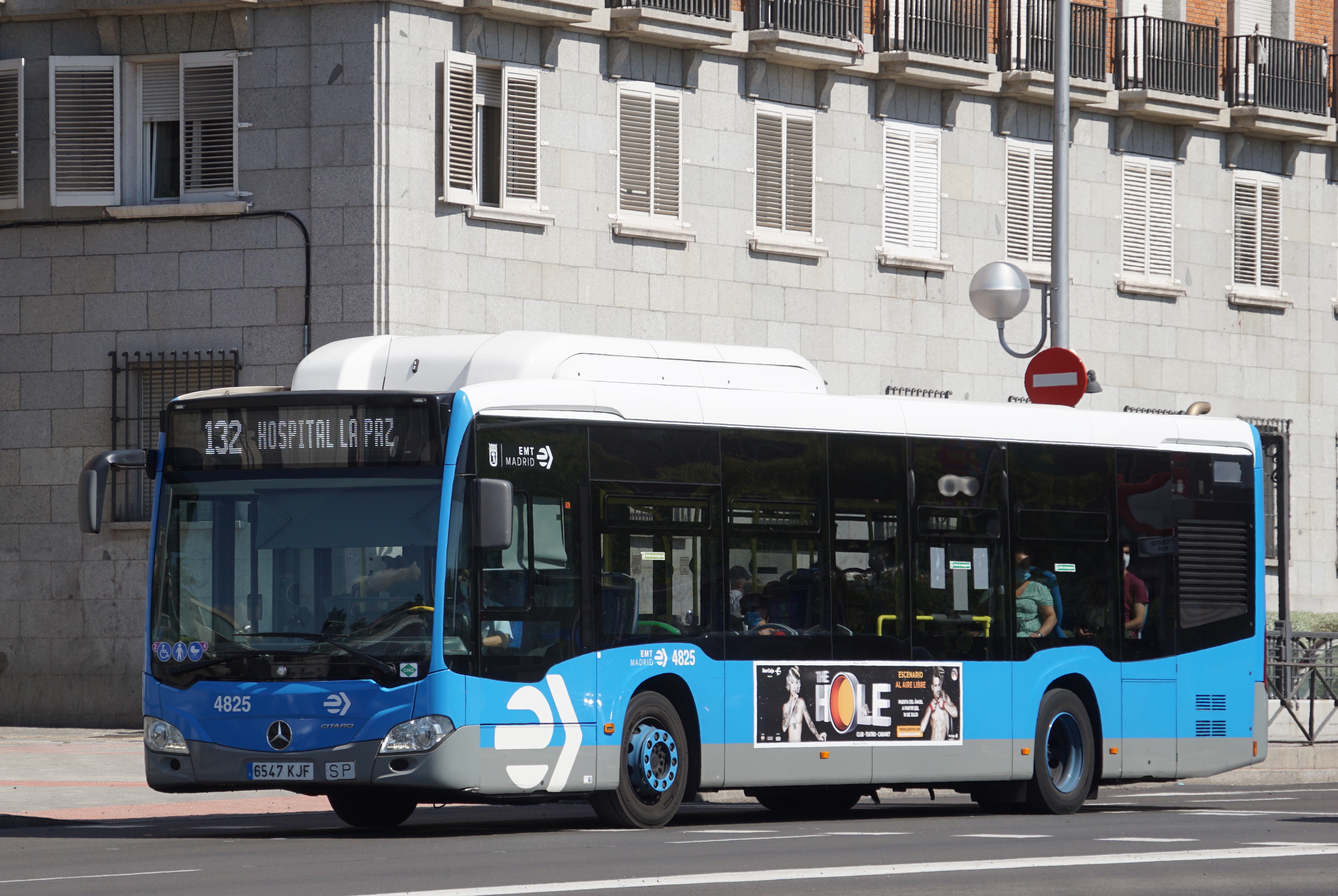 132 EMT Madrid en Moncloa, agosto 2020